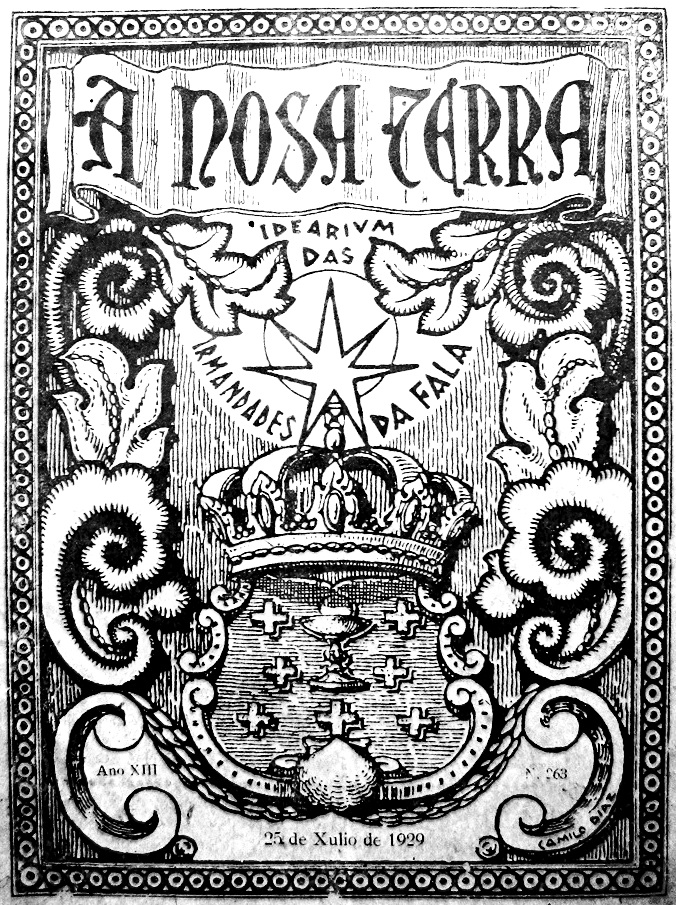 A Nosa Terra, idearium das Irmandades da Fala, Ano XIII, n. 263, 25 de xulio de 1929, Camilo Díaz